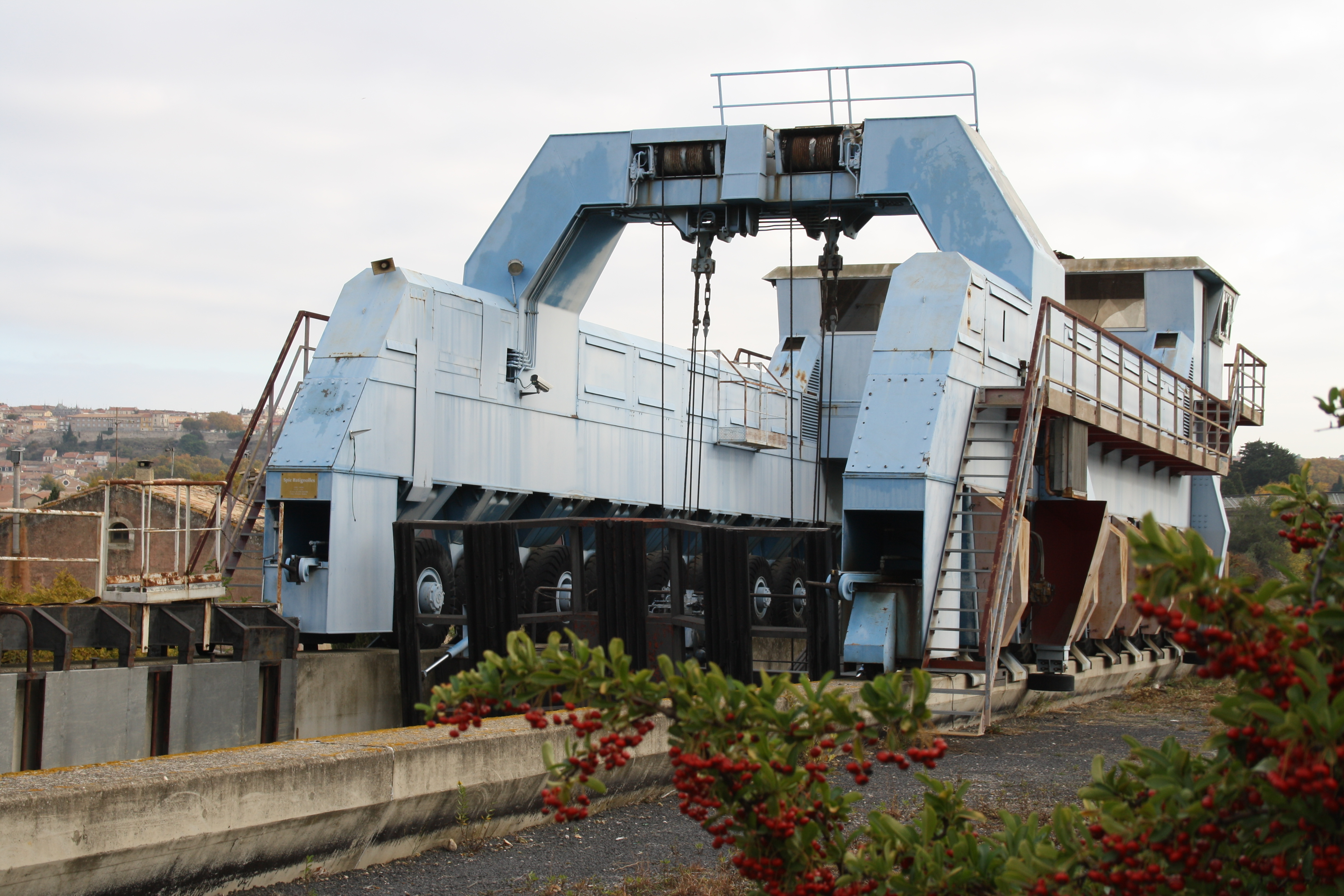 Traktor Fonserannes